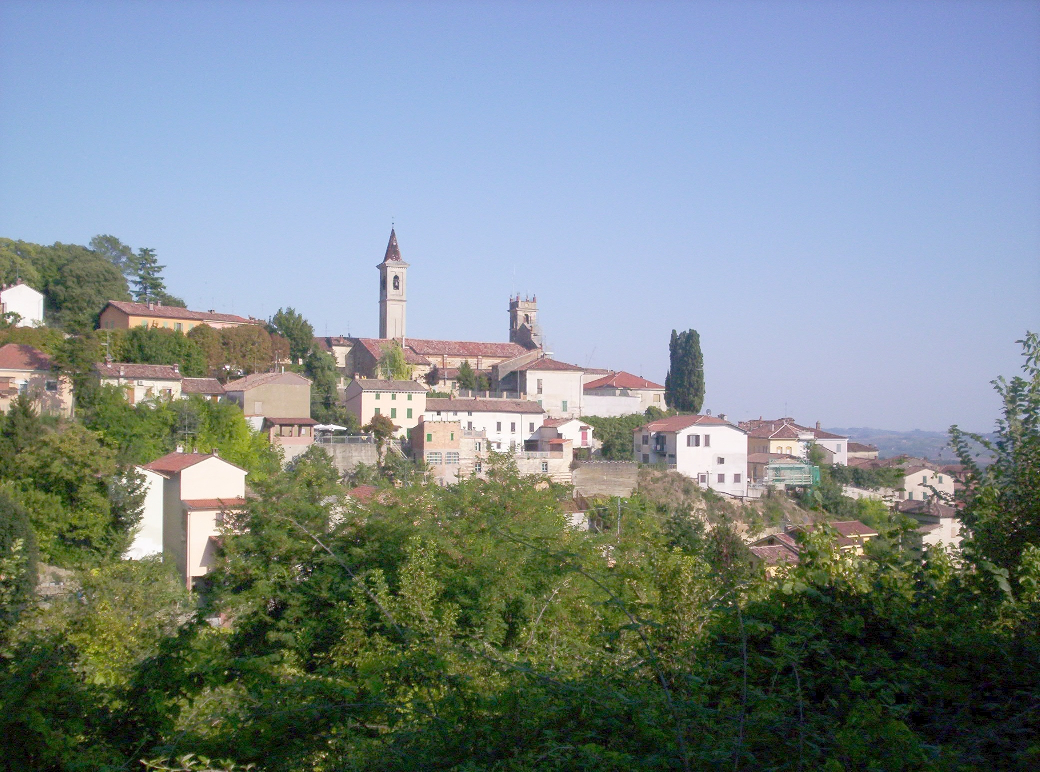 view of Rosignano Monferrato (AL), Italy